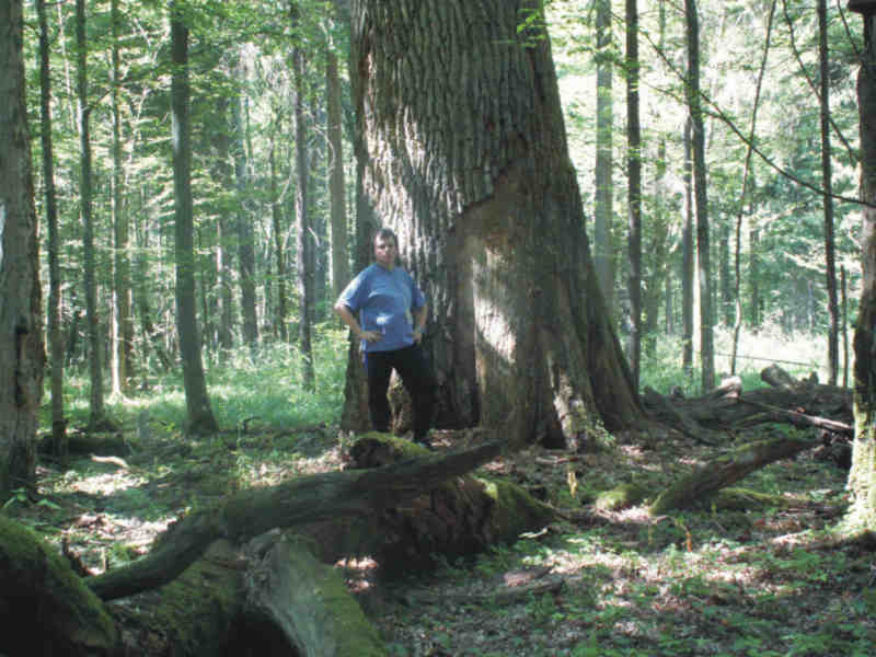 Dąb Dominator. Author: Tomasz Niechoda